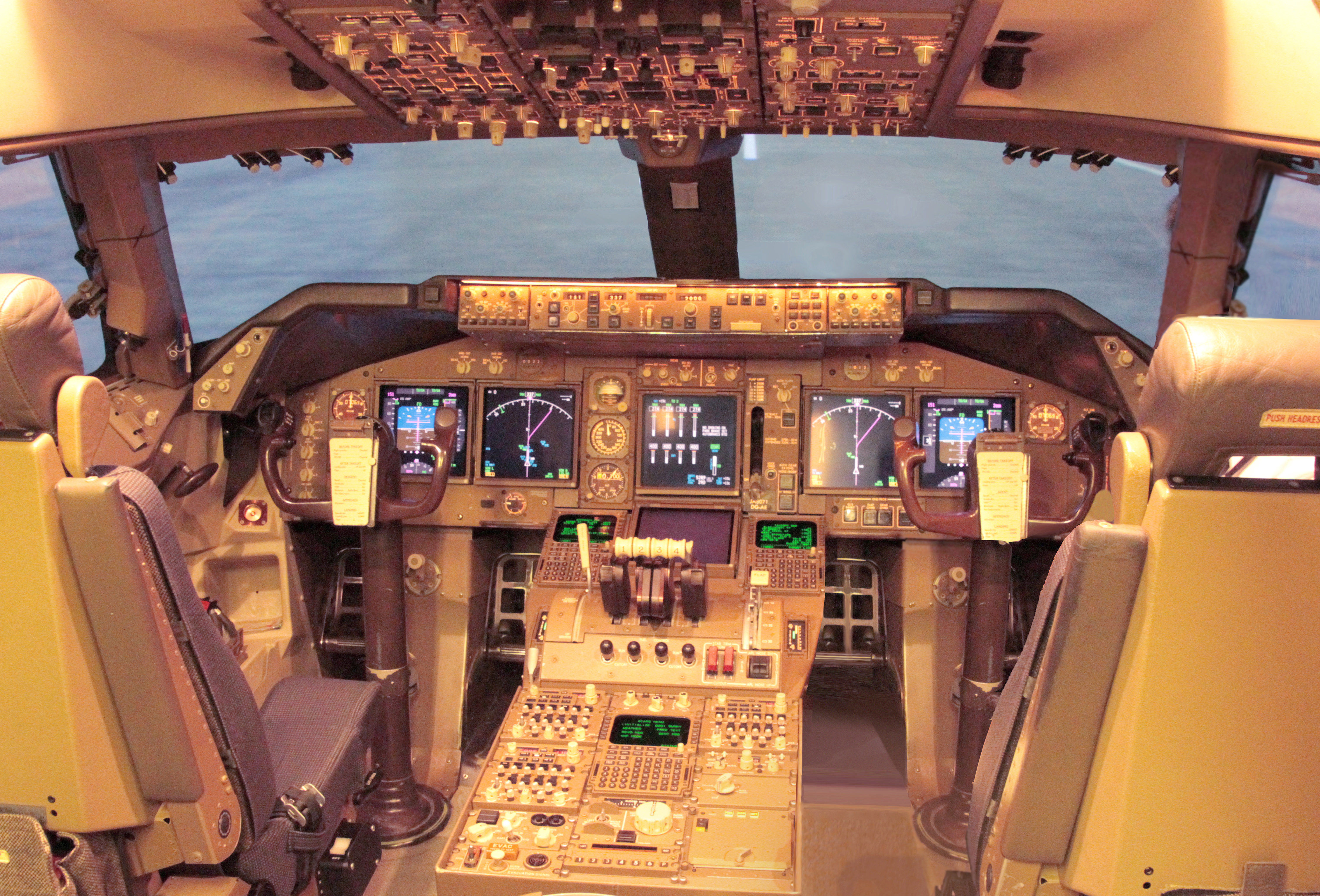 JAL 機体整備工場 見学会